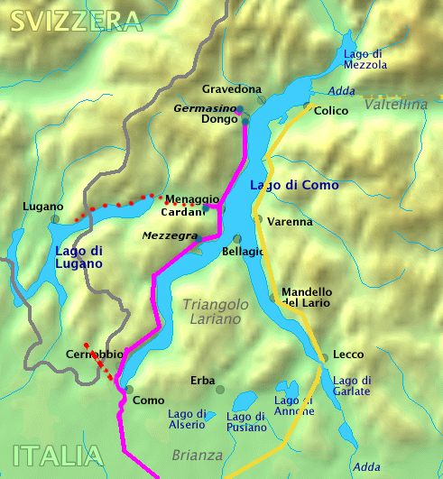 percorso di Benito Mussolini ultimi giorni